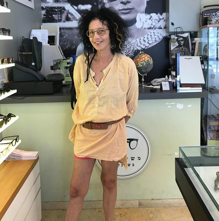 עידית יולזרי